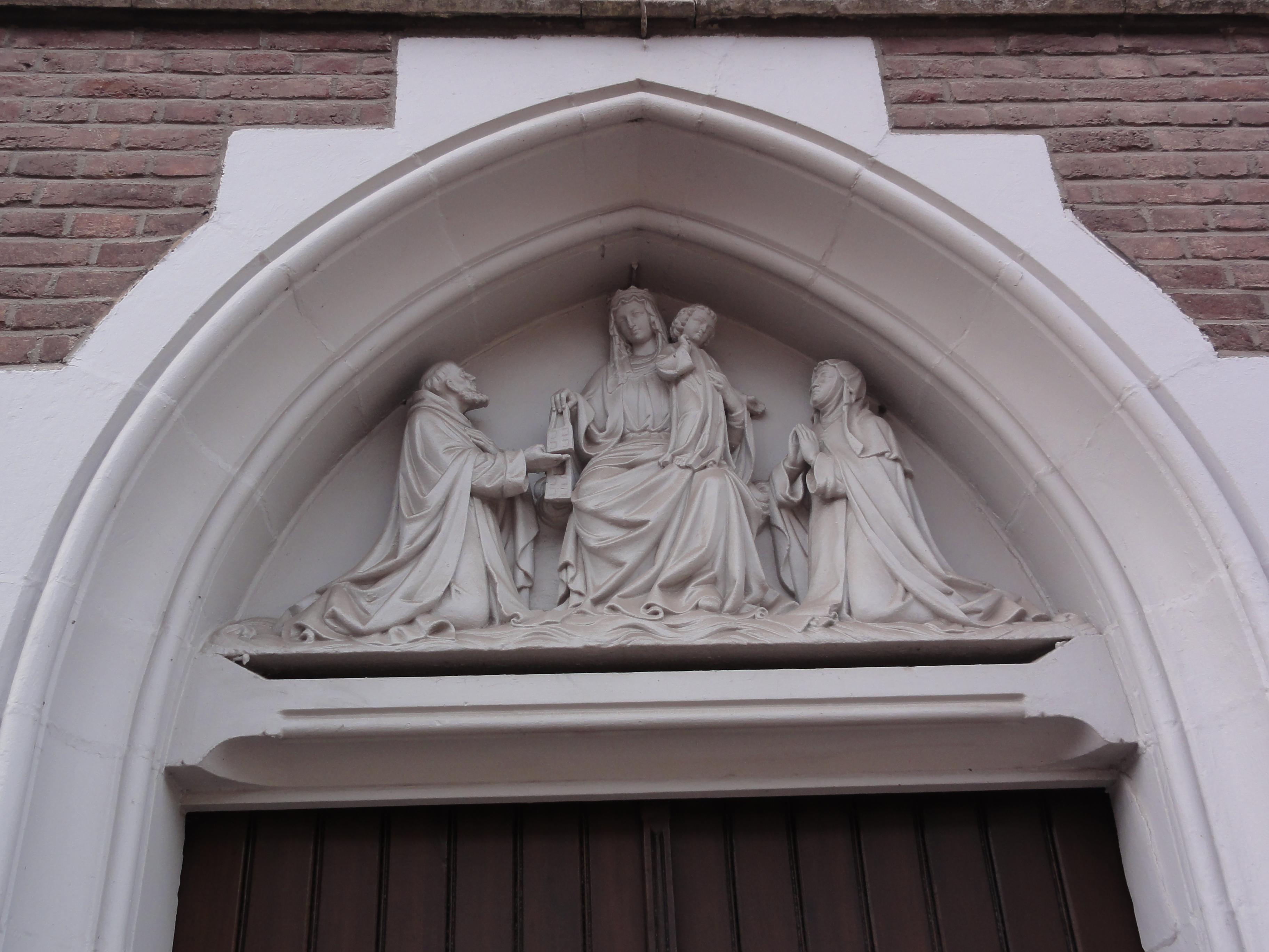 Echt (Limburg)